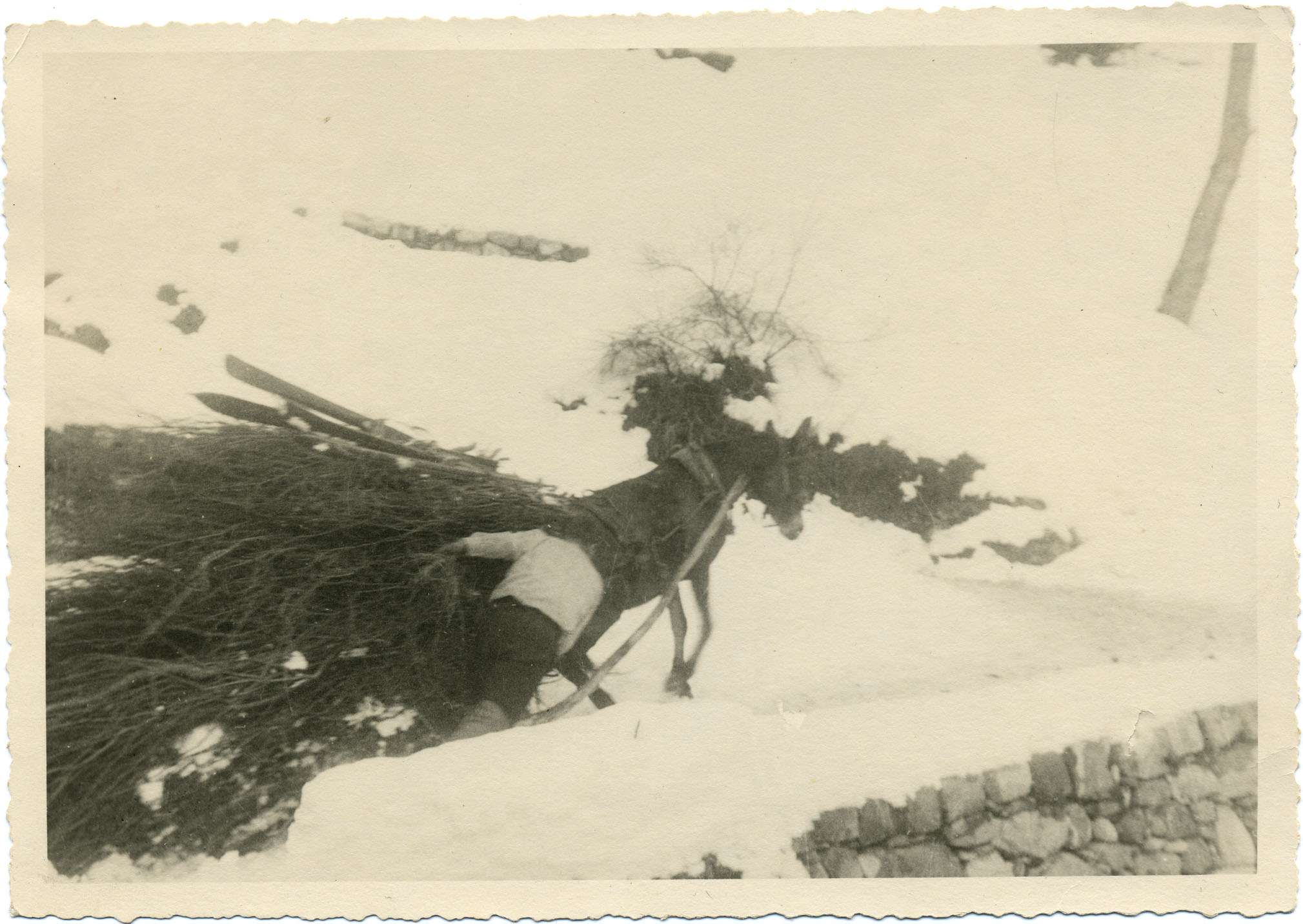 Vecchia mulattiera per l'Alpe - Ponte di Vigna - Uomo con mulo traina fascine di legno. Archivio Pietro Pensa, fondo fotografico, selezione di Elvia Redaelli, 2008, n. 1.